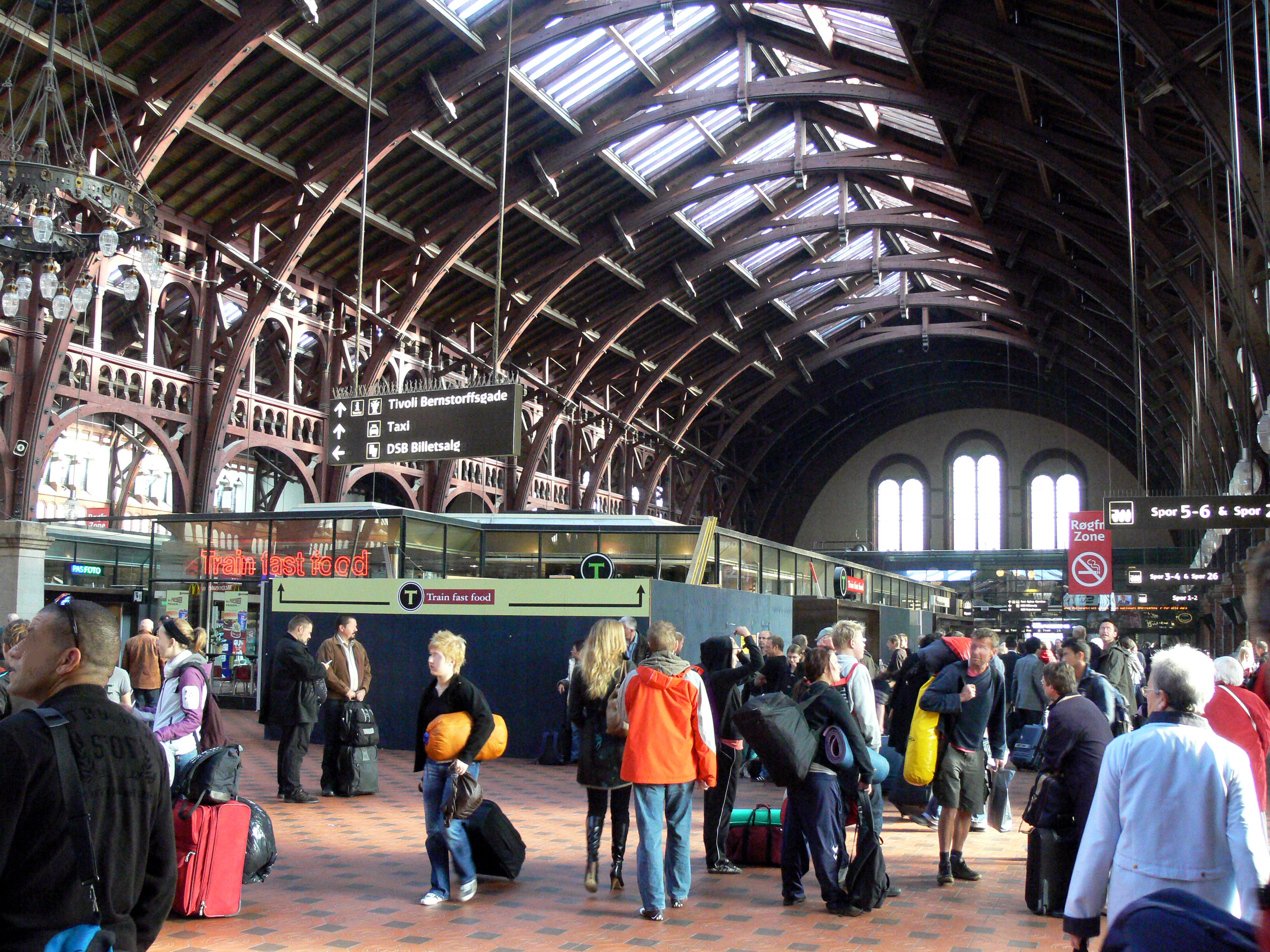 Københavns Hovedbanegård; Hauptbahnhof